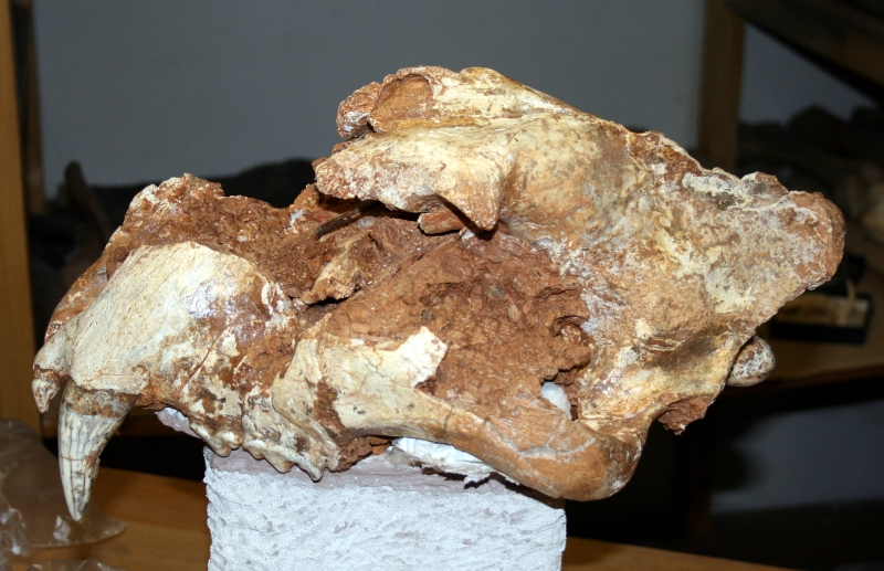 glava špiljskog lava (Panthera spelaea), pronađena u jami Vrtare male u Dramlju, Hrvatska